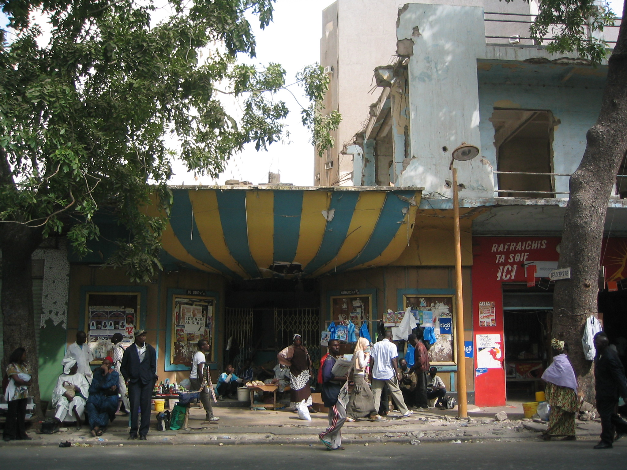 Un cinéma désaffecté à Dakar (Cinéma ABC - avenue Lamine Gueye)